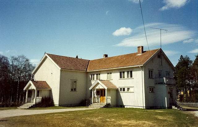 Koppang kirke